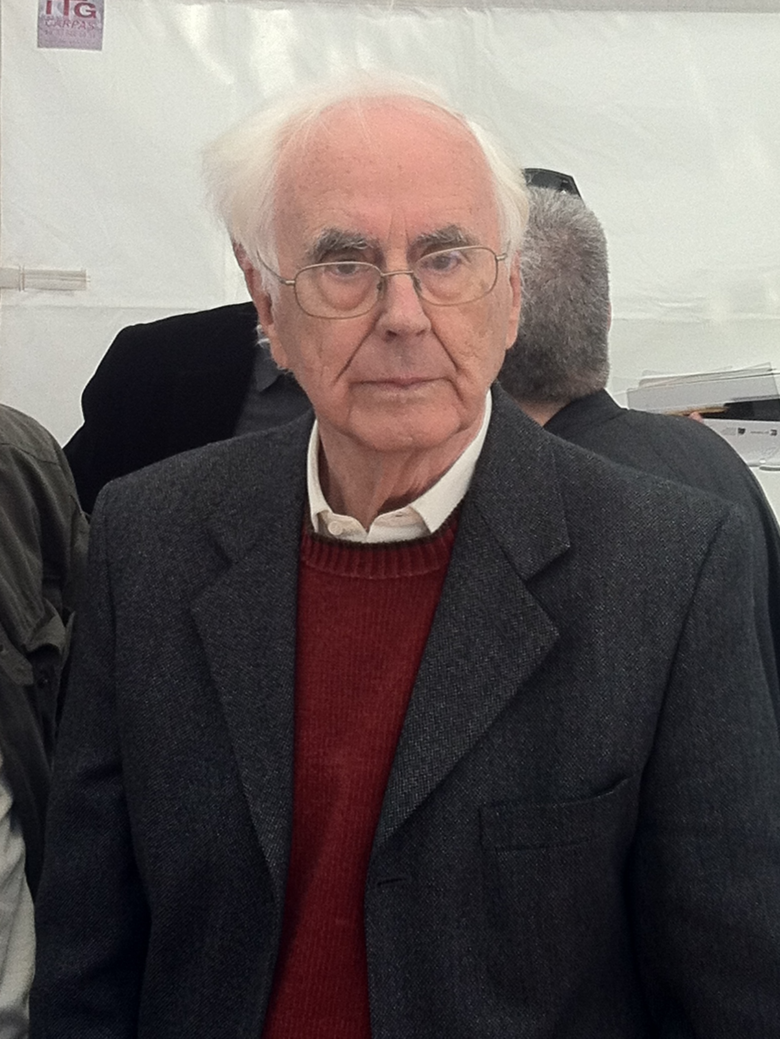 Josep maria espinàs. Diada de Sant Jordi 2014